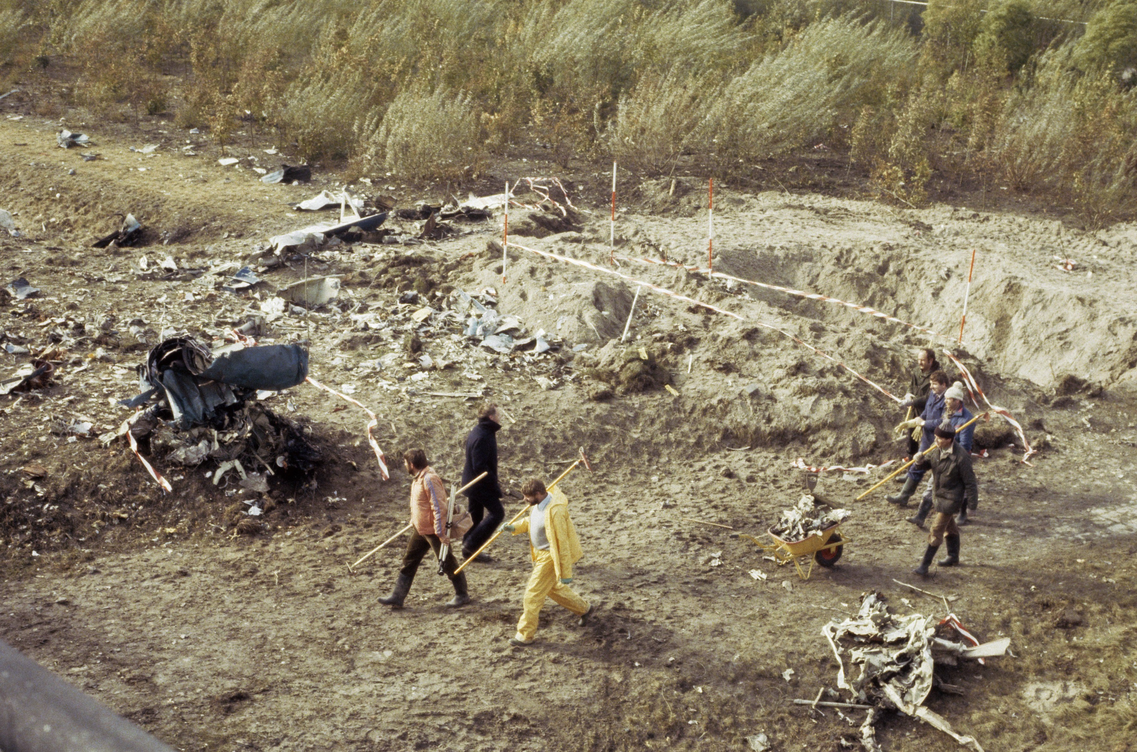 Collectie / Archief : Fotocollectie Anefo Reportage / Serie : [ onbekend ] Beschrijving : Berging van vliegtuigresten en stof. resten van slachtoffers na de vliegramp bij Moerdijk waarbij een Fokker Fellowship van de NLM is neergestort / Datum : 8 oktober 1981 Trefwoorden : BERGING, SLACHTOFFERS, Vliegrampen Persoonsnaam : Fokker Fellowship Fotograaf : Croes, Rob C. / Anefo Auteursrechthebbende : Nationaal Archief Materiaalsoort : Dia (kleur) Nummer archiefinventaris : bekijk toegang 2.24.01.06 Bestanddeelnummer : 253-8607